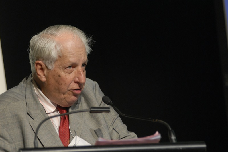 Gustav Nosal